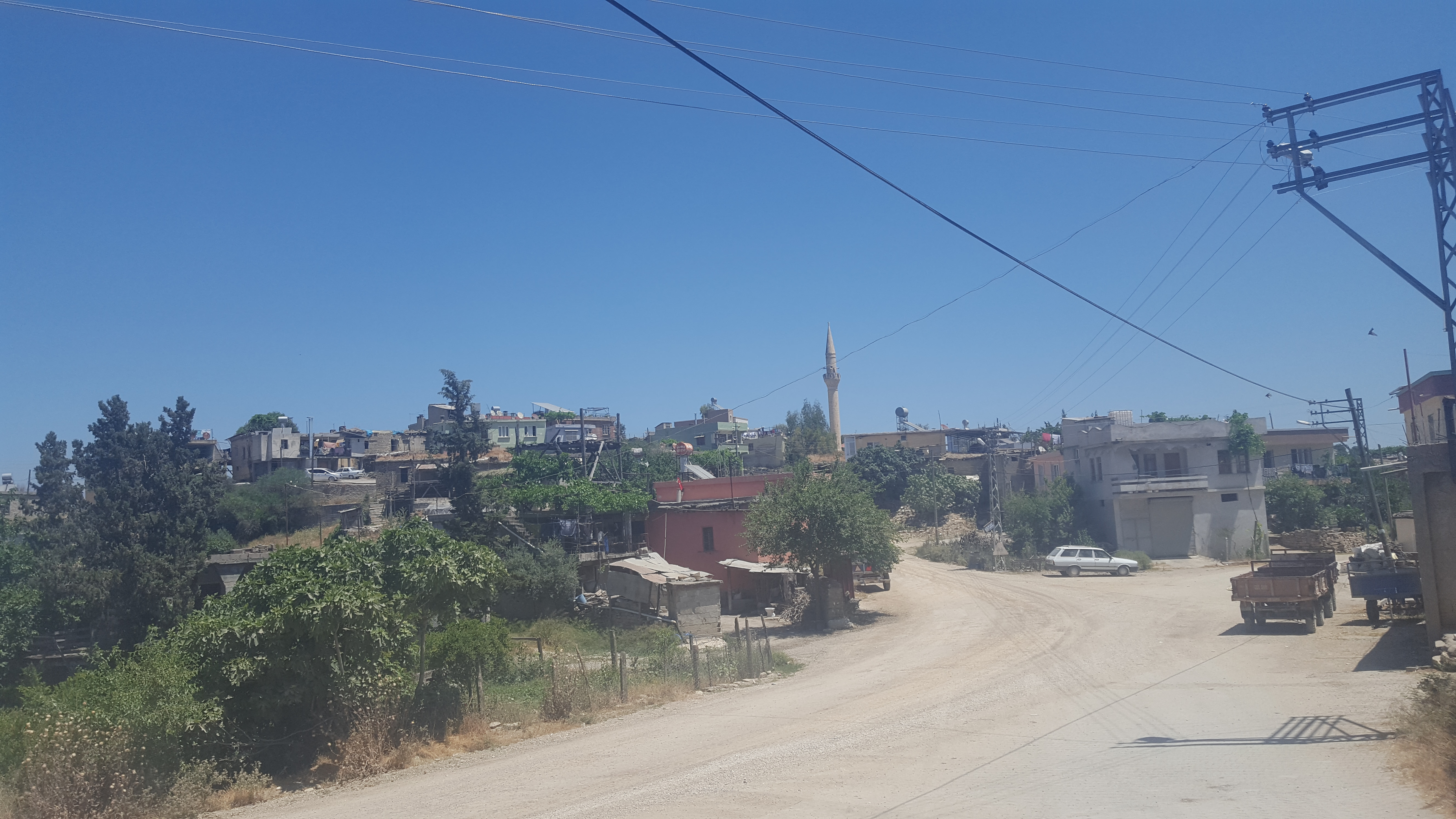 Köy merkezi